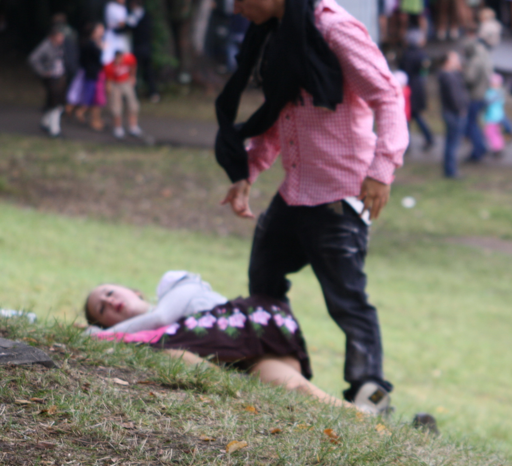 Betrunkene Frau im Dirndl am Oktoberfest.